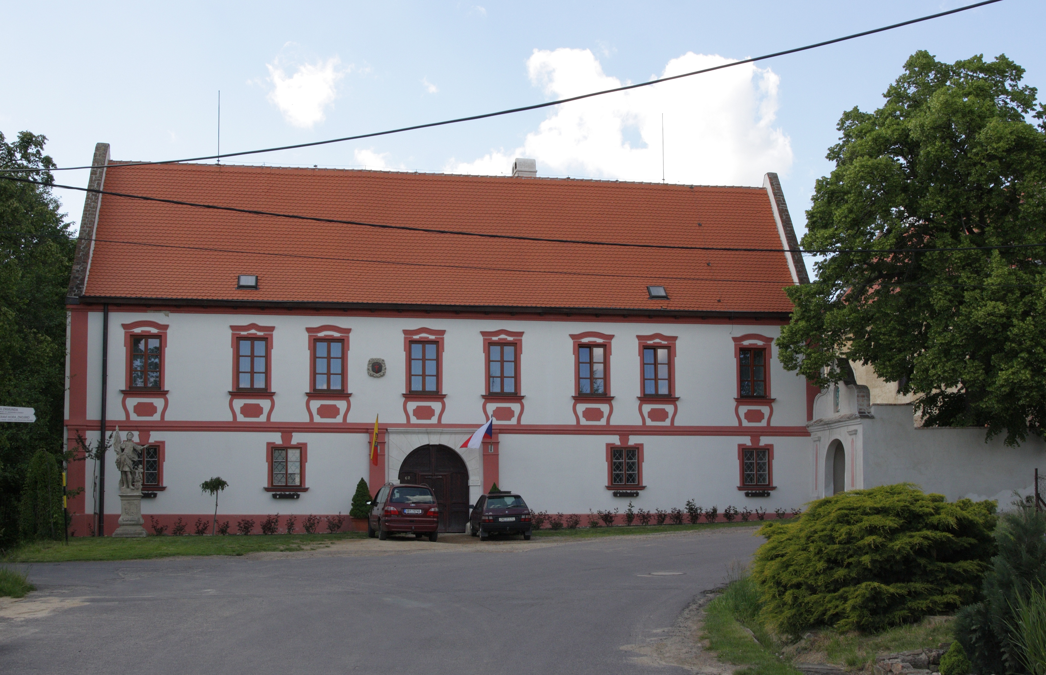 Popice (Znojmo) - fara.